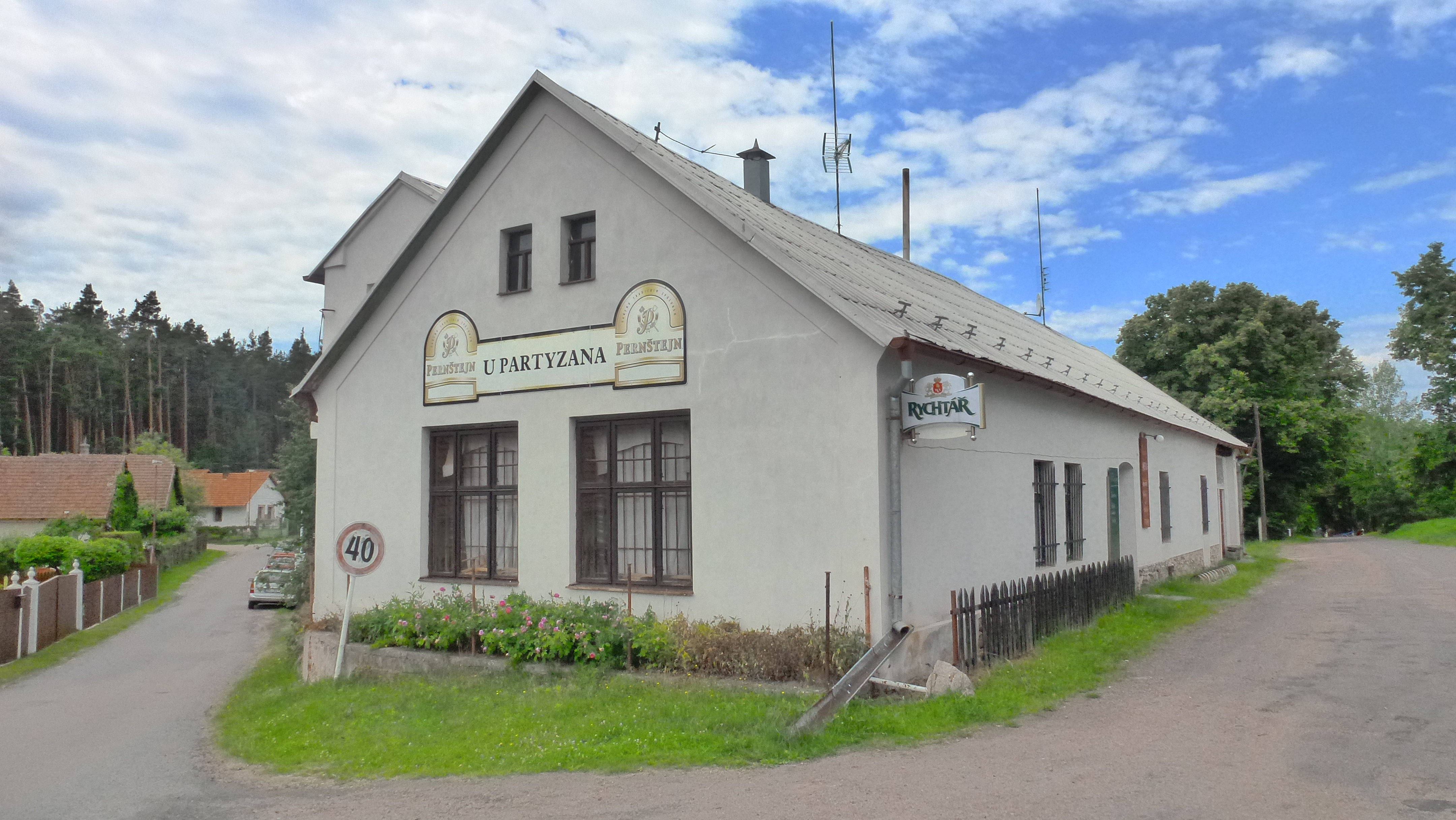 Hospoda u Partyzána na rozcestí v obci Krasnice